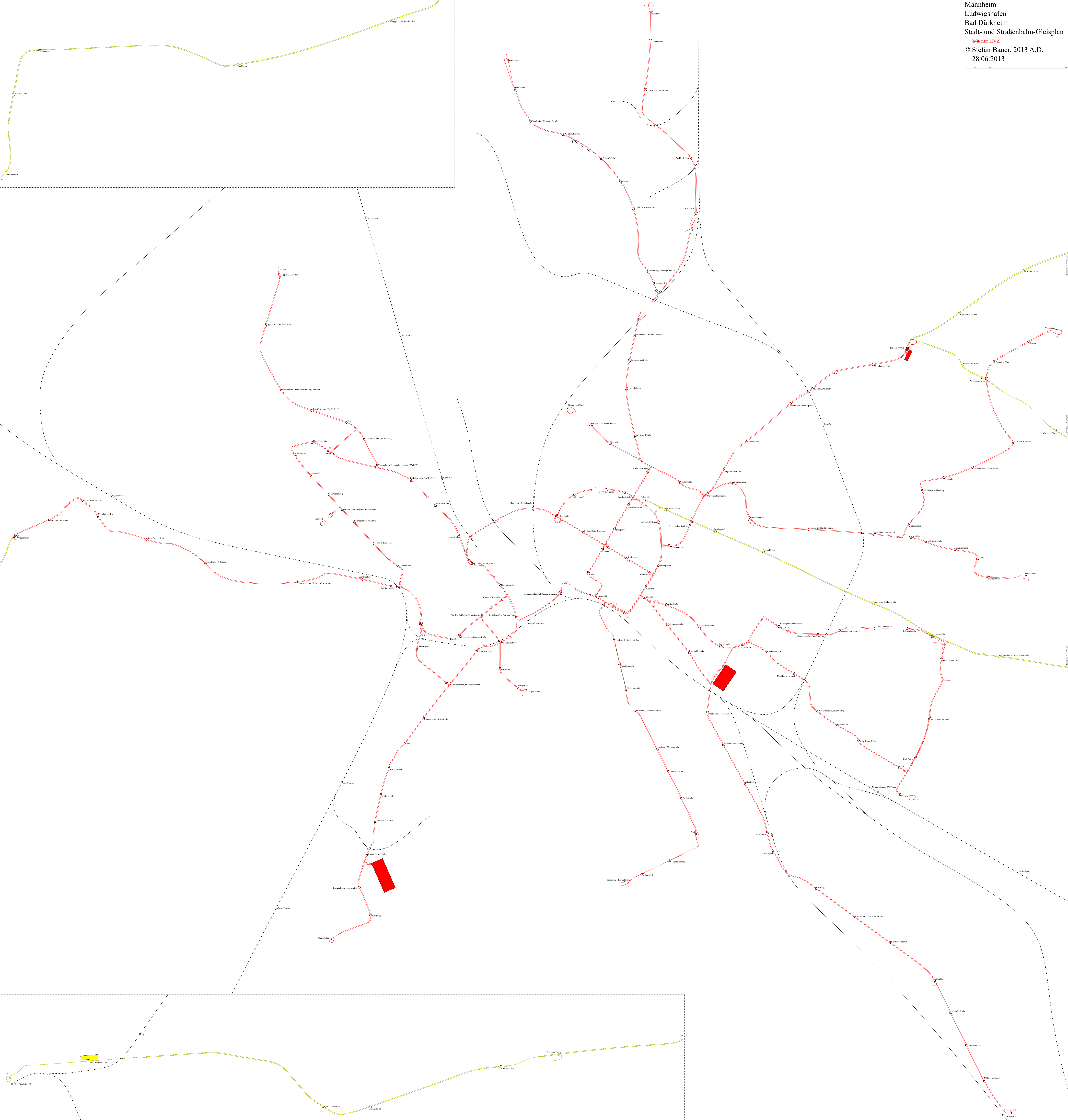 Stadt- und Straßenbahn-Gleisplan Mannheim-Ludwigshafen-Bad Dürkheim 2013